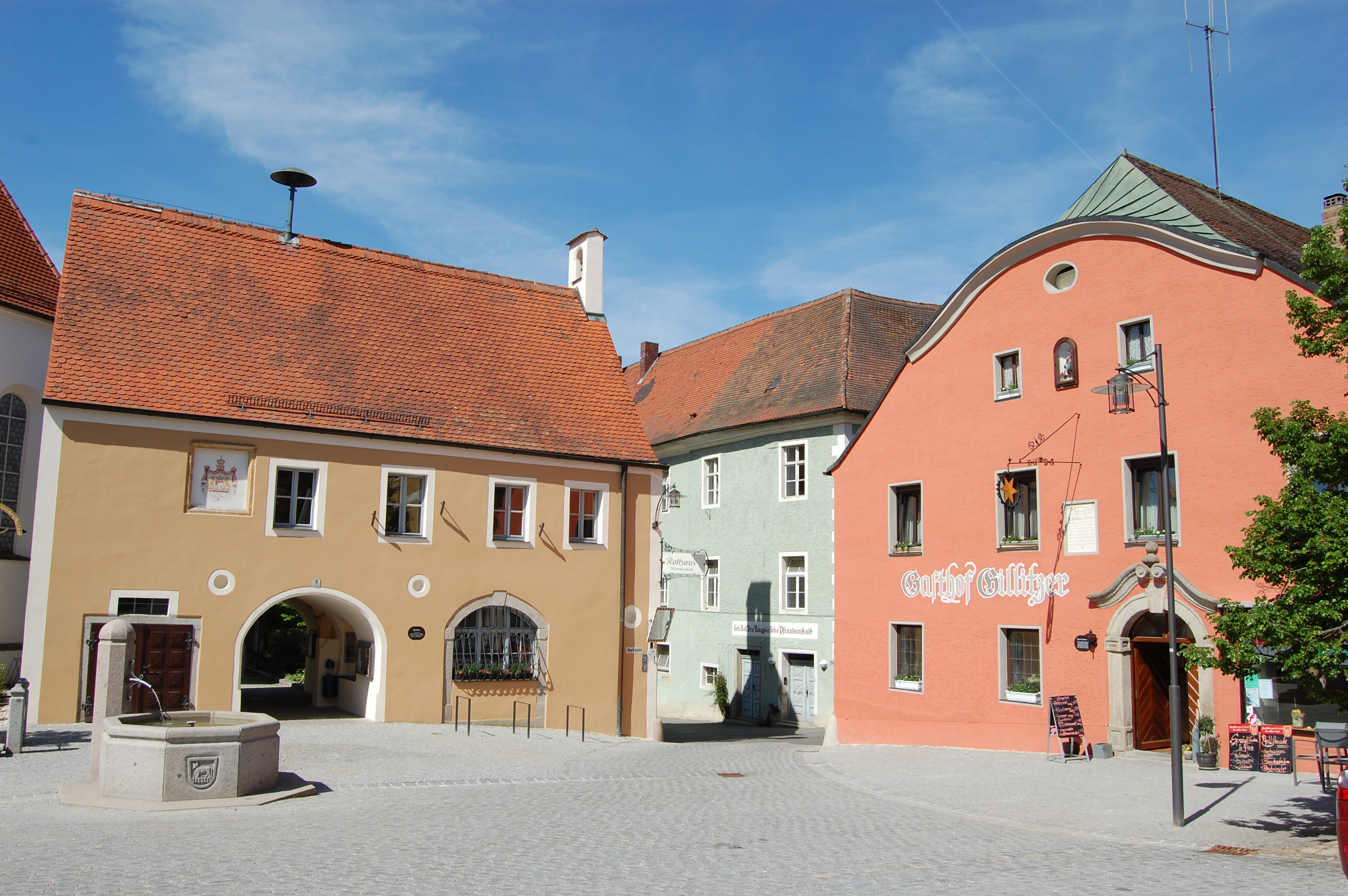 Schwarzhofen, Rathaus mit Marktplatz, Bildmitte ehemaliges Kloster der Dominikanerinnen, Landkreis Schwandorf, Oberpfalz, Bayern (2011)